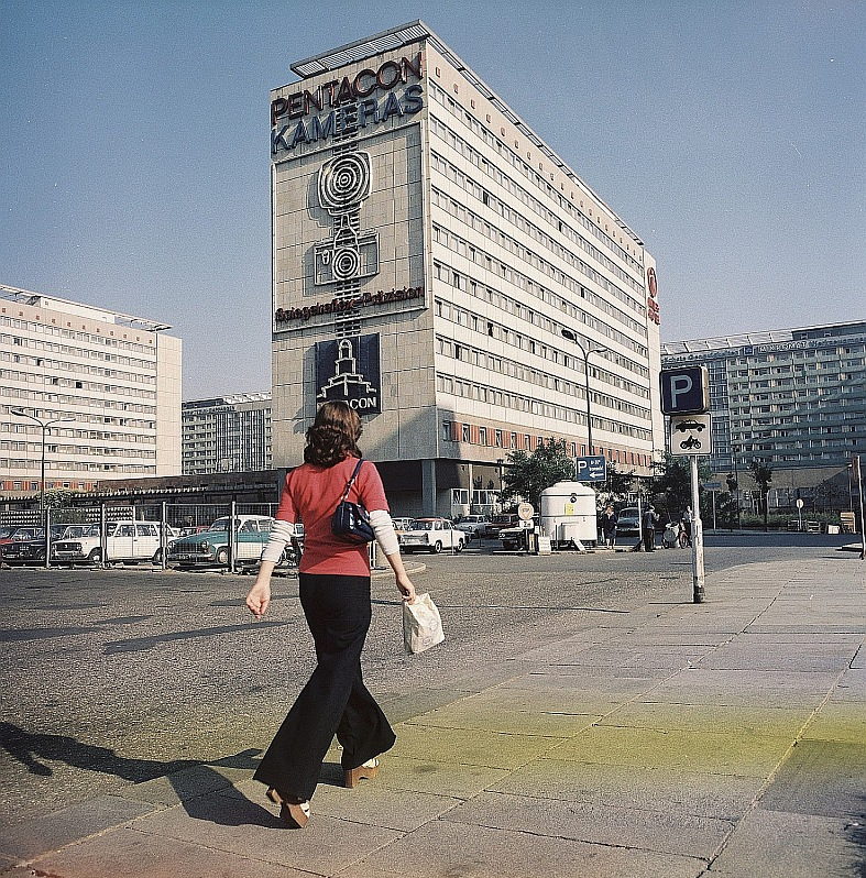 Original image description from the Deutsche FotothekDresden. Hotel Bastei